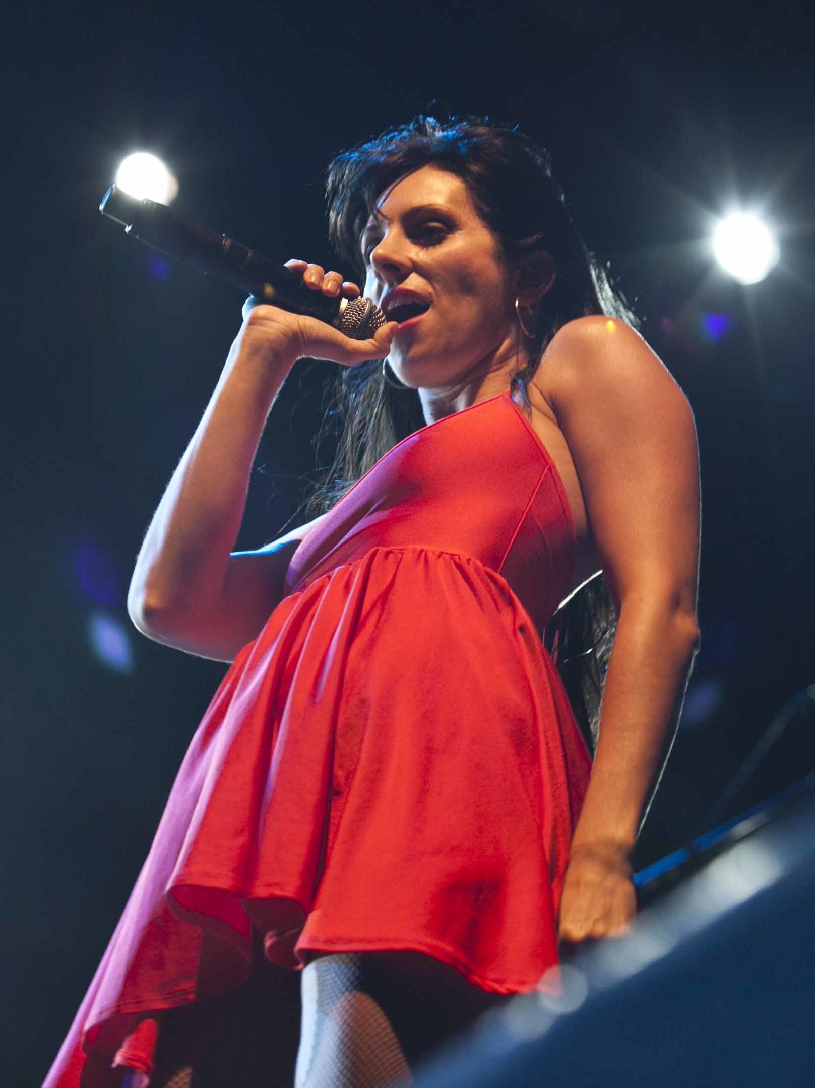 La Mala Rodríguez en la Semana Grande de San Sebastián de 2012 Argazkilaria / Fotógrafa: Sara Santos